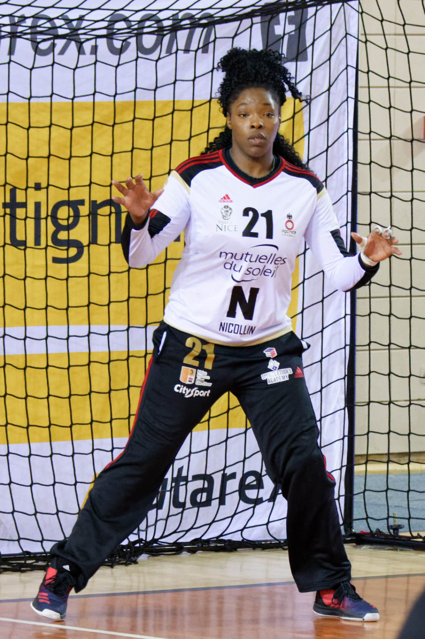 Rencontre de championnat entre Issy Paris Hand et OGC Nice. A Issy Les Moulineaux, le 2 février 2017.